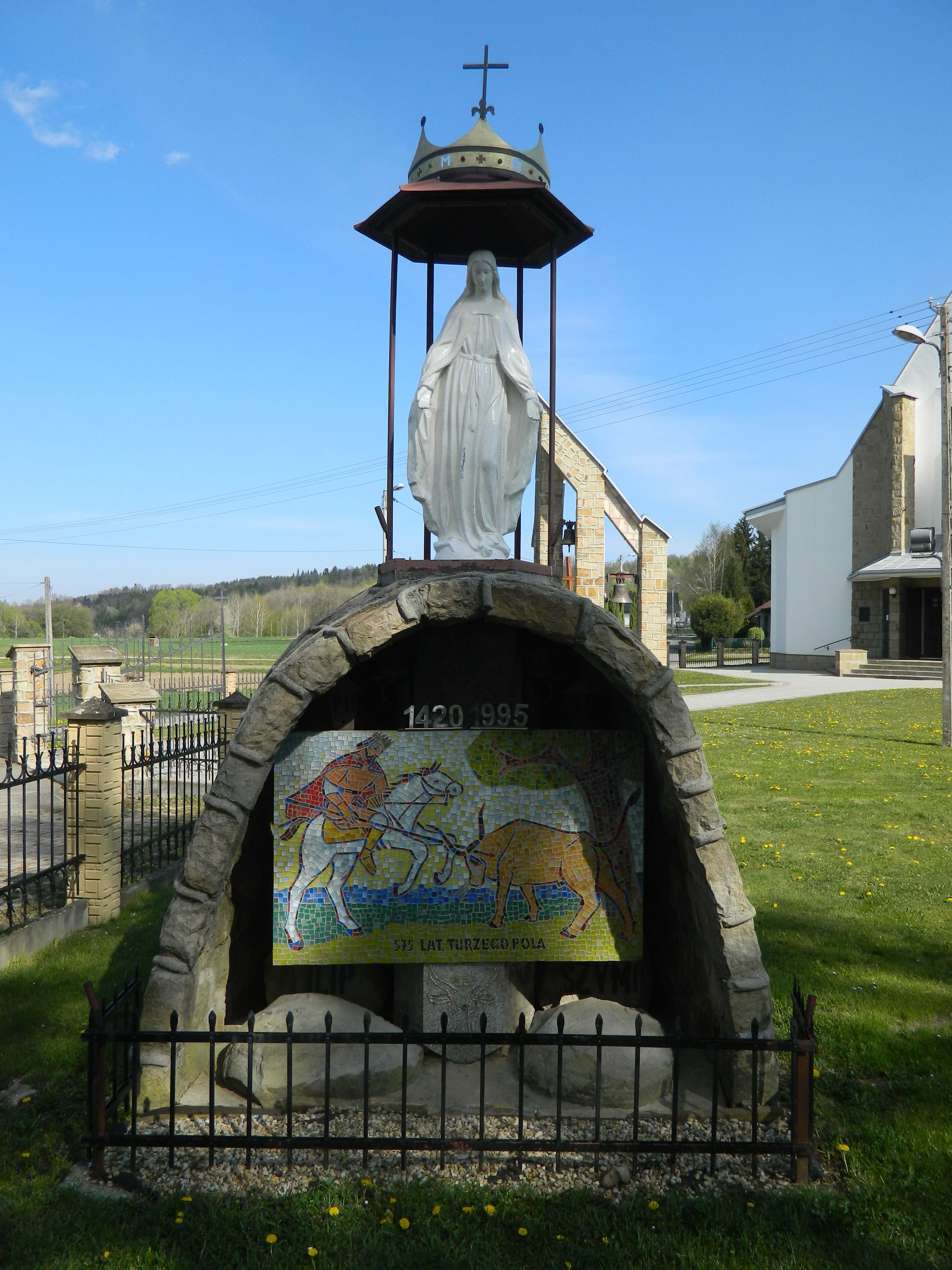 Grota jubileuszowa z 1995 przed kościołem w Turzym Polu. Widoczne zwierze to tur – od niego pochodzi nazwa wsi.